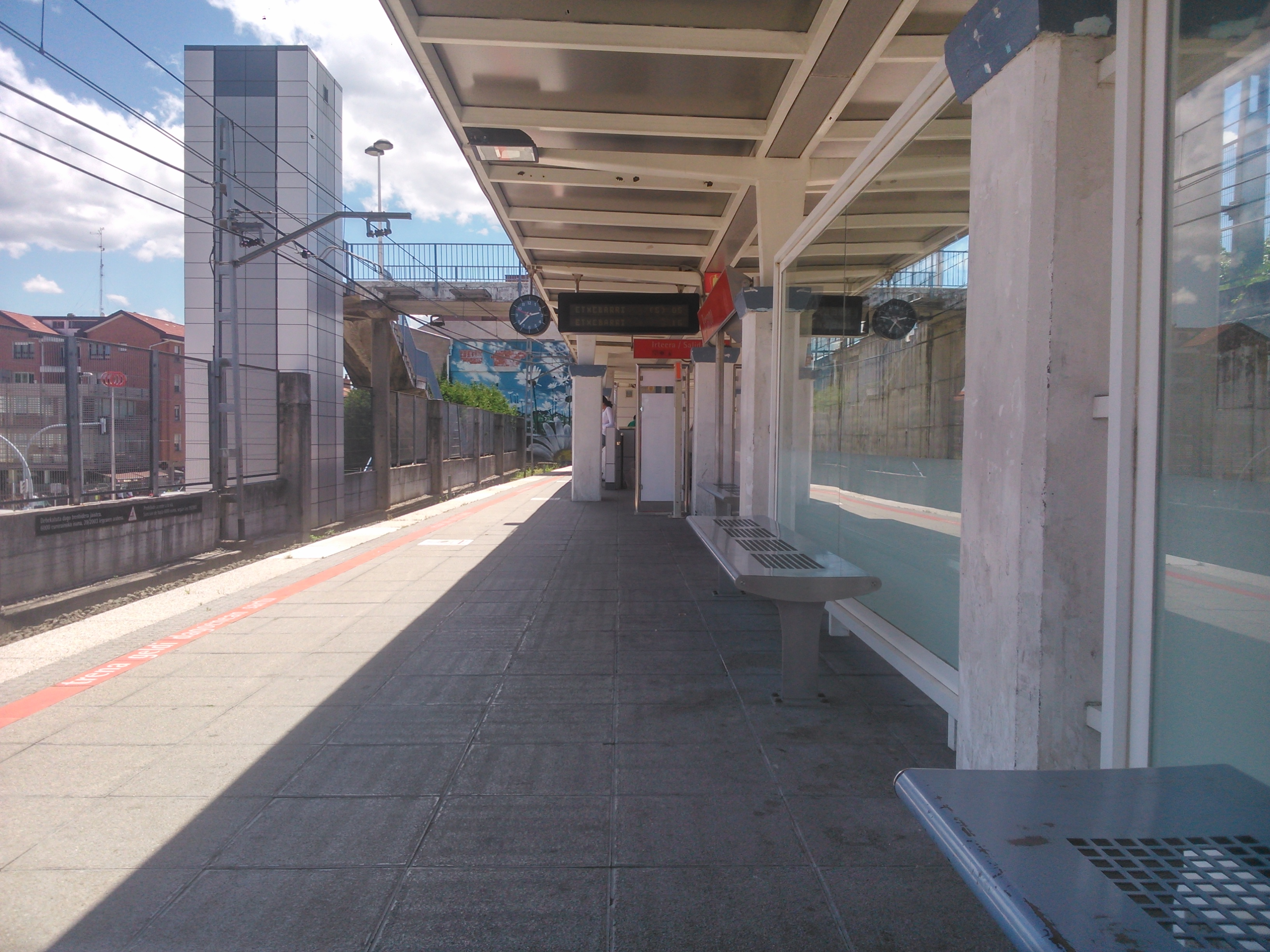 Berangoko metro geltokia